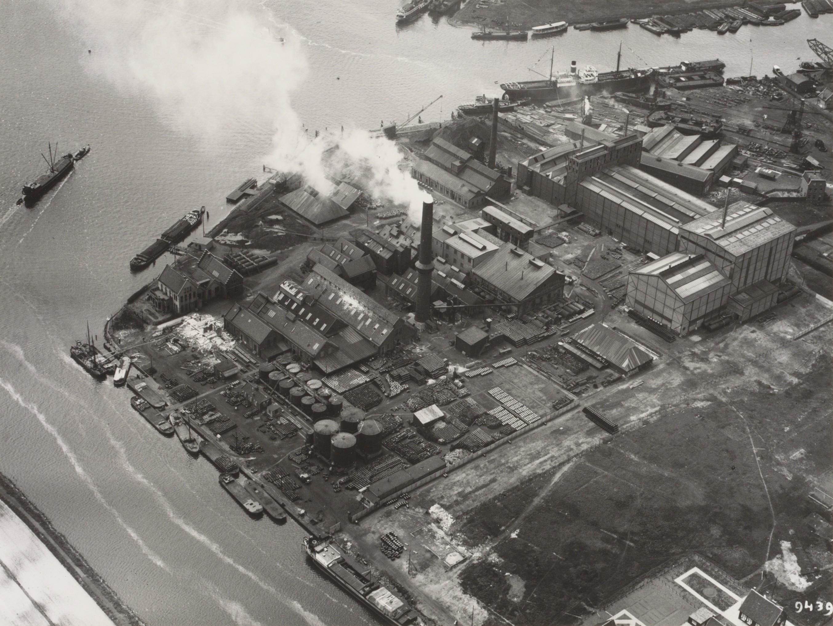 Beschrijving Luchtfoto van het terrein van de Koninklijke Zwavelzuurfabrieken Ketjen, Nieuwendammerkade 1-3 Gezien in westelijke richting met links het IJ. Foto uit het herinneringsalbum aangeboden aan ir. P.M. van Doormaal, president-directeur van Ketjen, op 30 december 1968. Documenttype foto Vervaardiger Onbekend Anoniem Collectie Collectie Stadsarchief Amsterdam: albums Datering 1930 Geografische naam Afgesloten IJ Nieuwendammerkade Inventarissen Afbeeldingsbestand ANWK00150000001